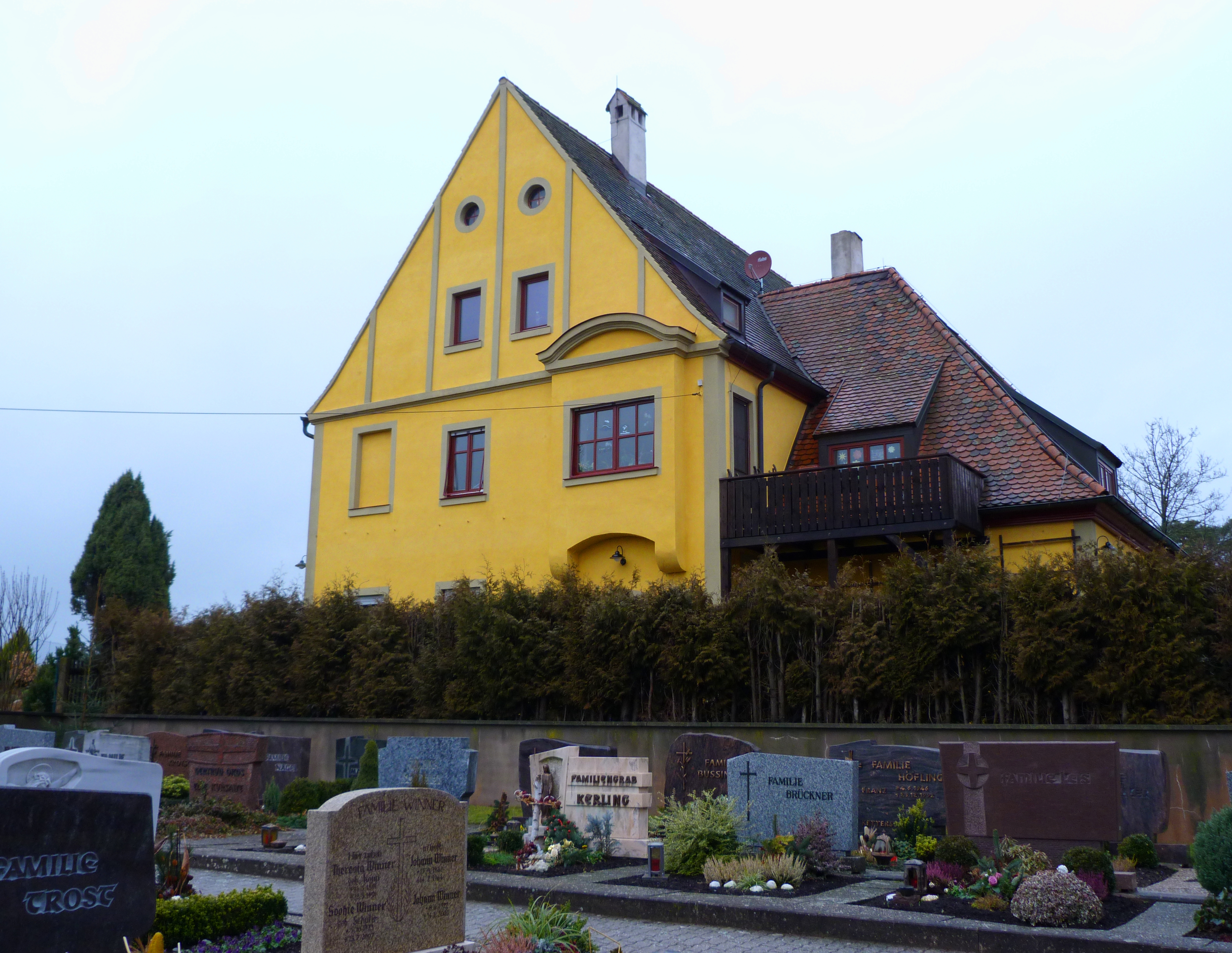 altes Schulhaus in Veitsaurach